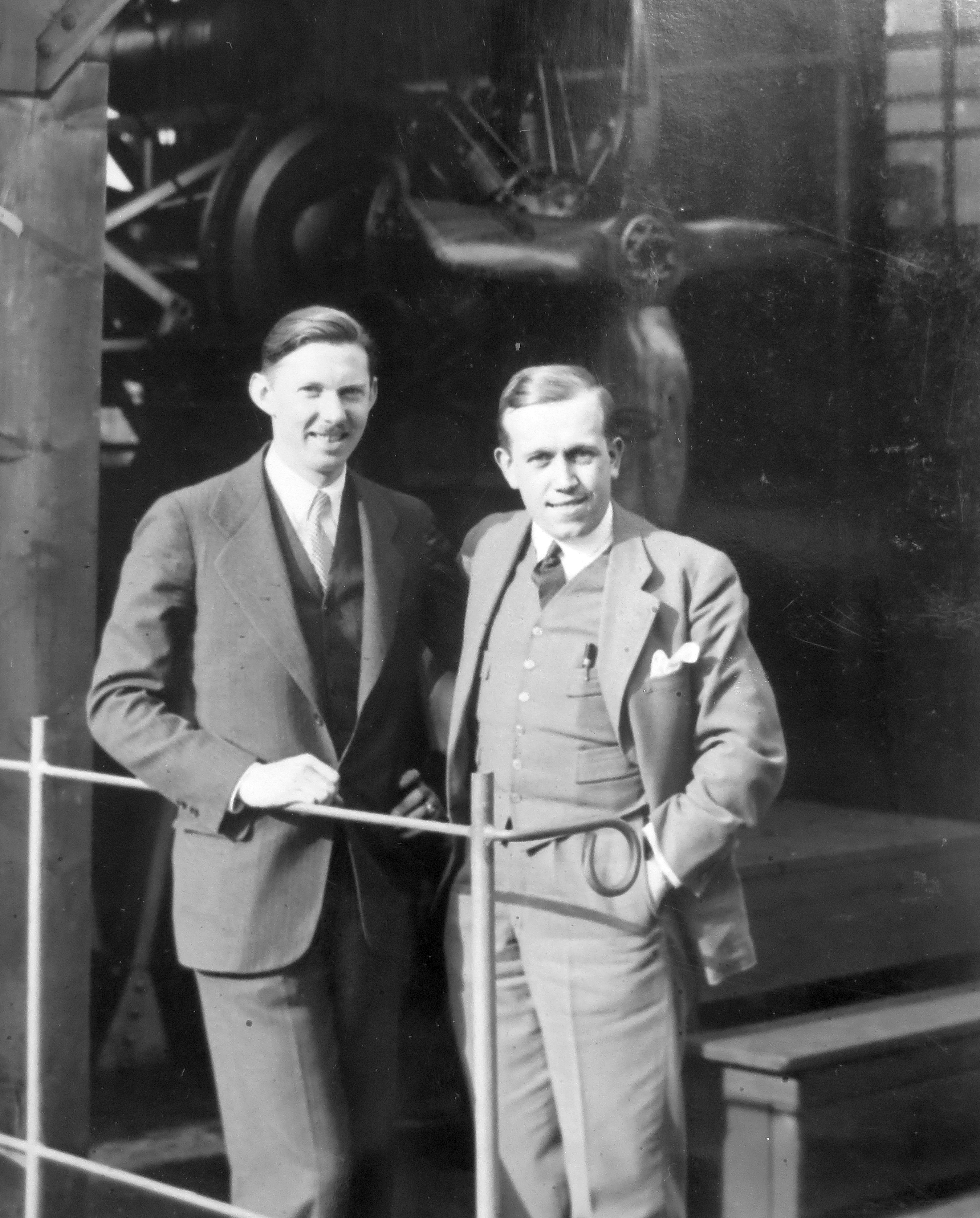 W.C. Brown (prezident fy. Spartan) a A. Kumpera (vrchní ředitel fy. Walter) na zkušebně motorů Walter po podpisu smlouvy na dodávku 500 motorů Walter NZ-120 ročně